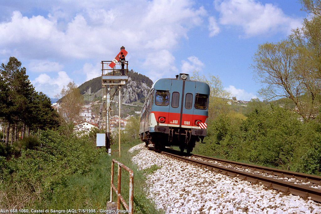 Castel di Sangro. Il segnale ad ala di seconda categoria, già allora tra gli ultimi esistenti sulla rete FS, attende l'ingresso dell'automotrice isolata proveniente da Sulmona.